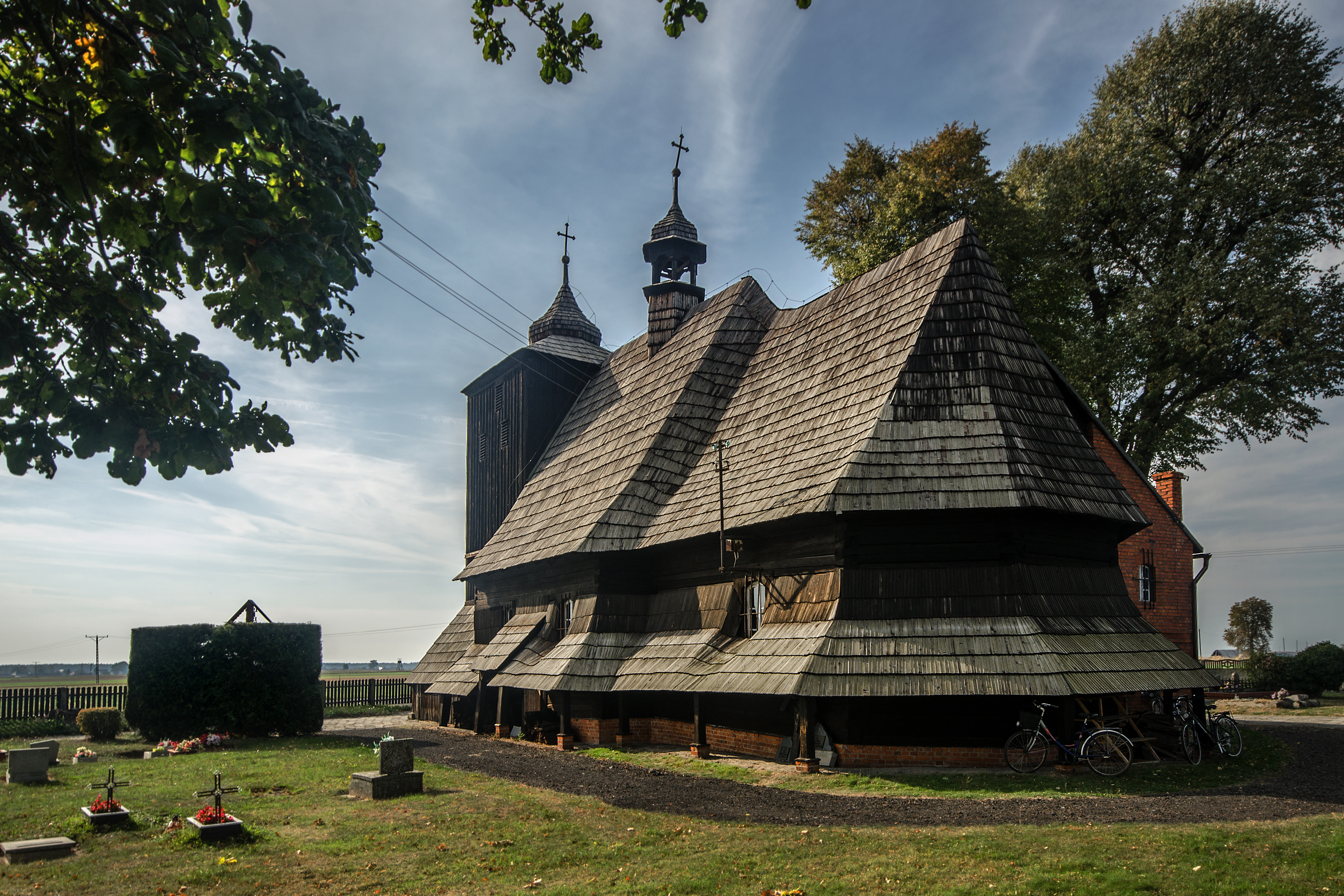 Zakrzów Turawski, kościół fil. p.w. śś. Piotra i Pawła, 1759